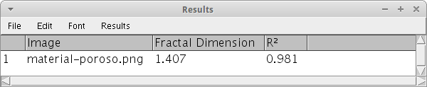 Dimensão fractal obtida da saída do plugin Bonej do software Imagej